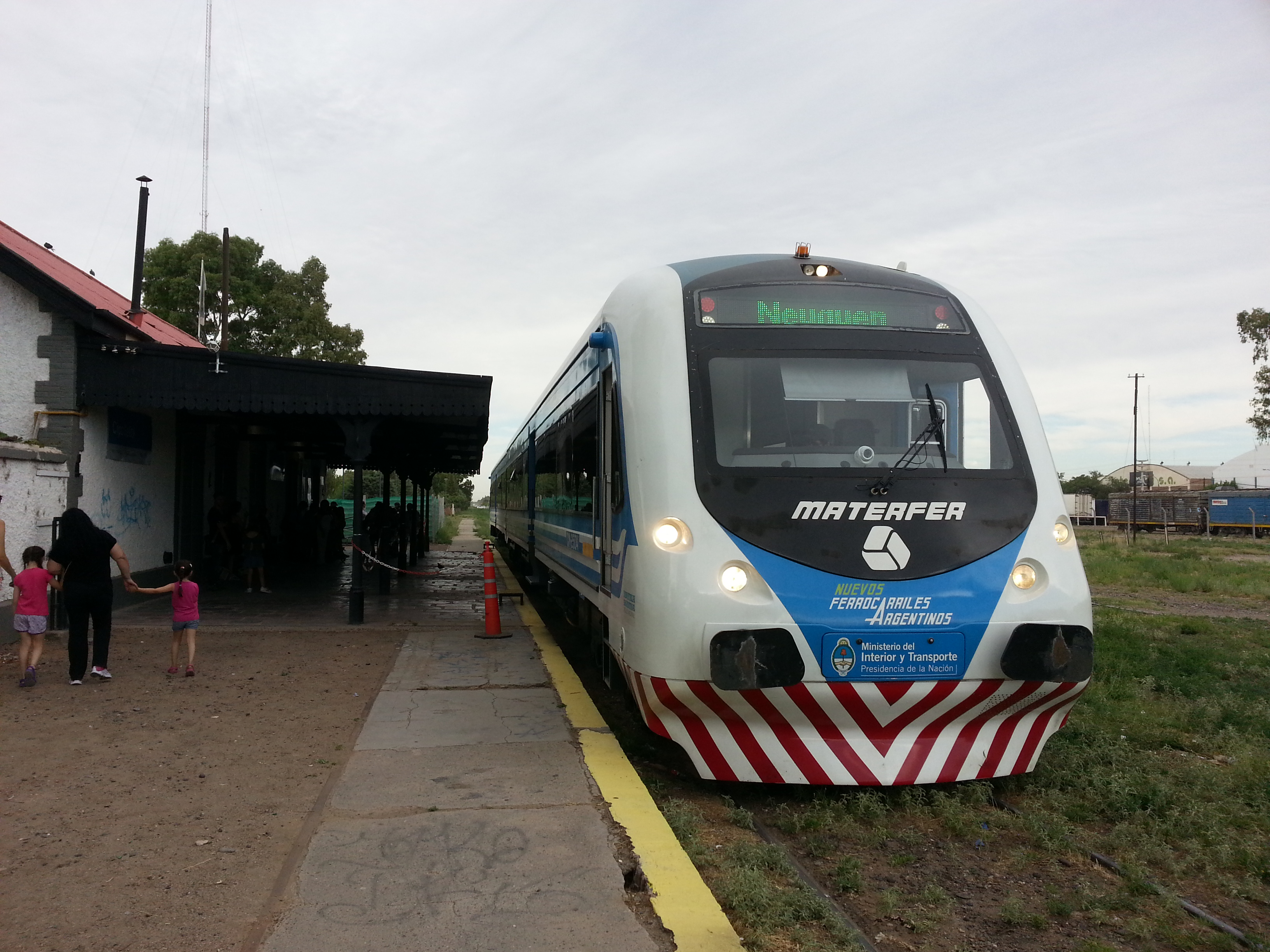 Coche motor Materfer detenido en Cipolletti